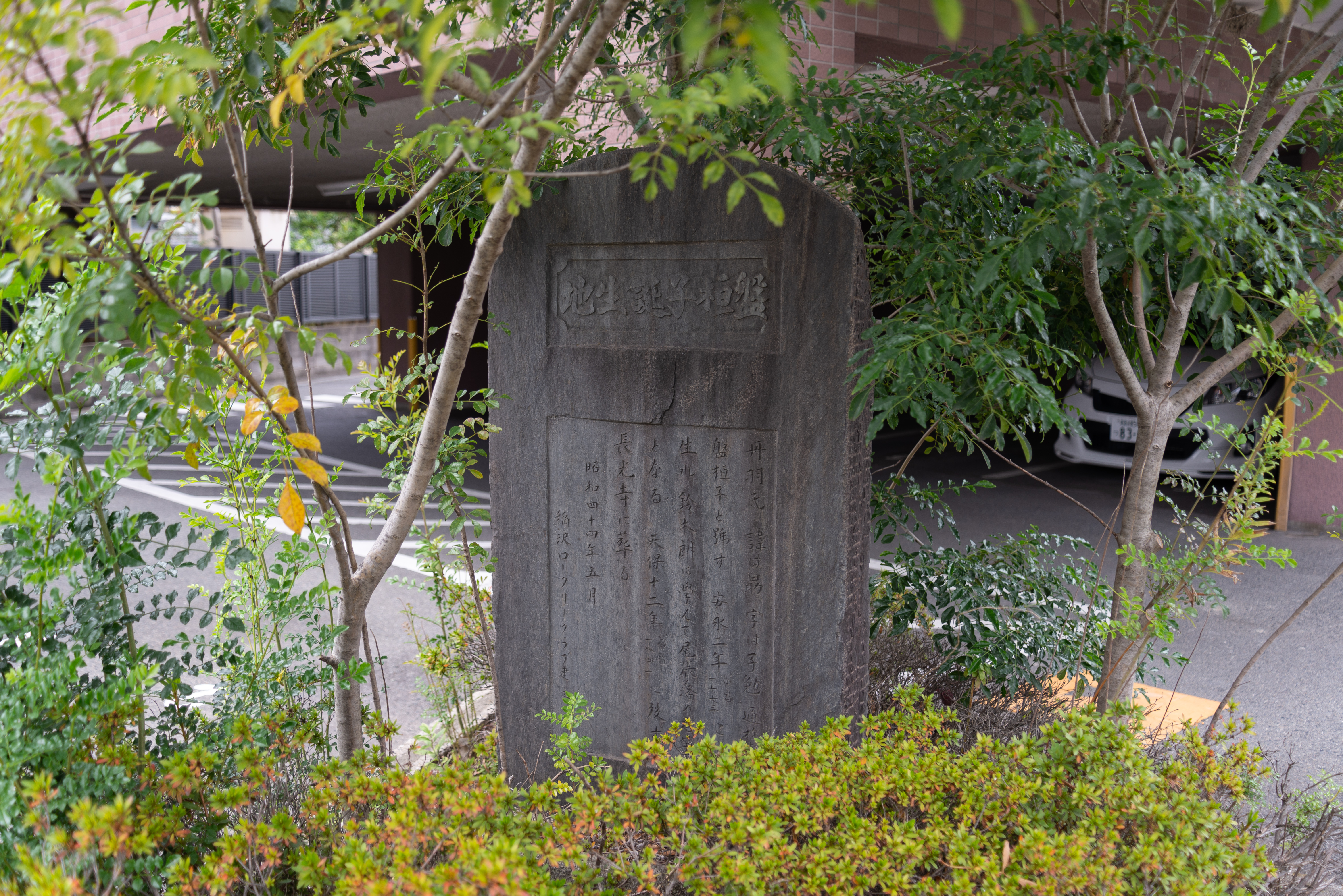 愛知県稲沢市井之口町にある丹羽盤桓子の生誕の地を示す石碑